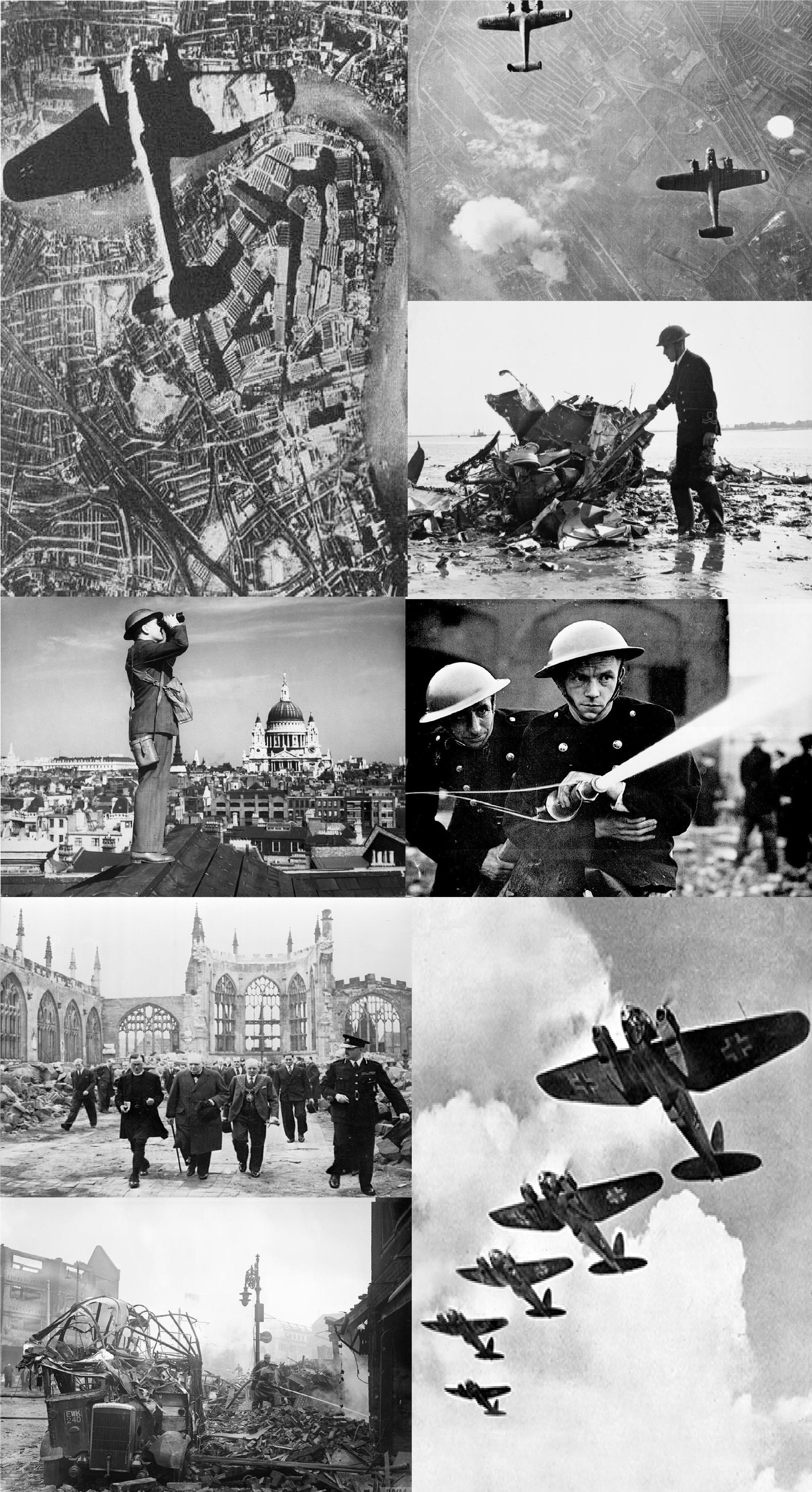 Collage of Battle of Britain